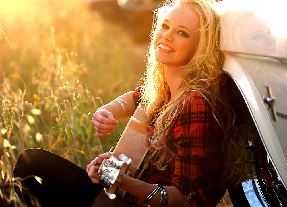 Pressefoto des Albums "Sunshine (acoustic)" 2015 ©2015 a2k-media & music / Foto: Thomas Kiehl